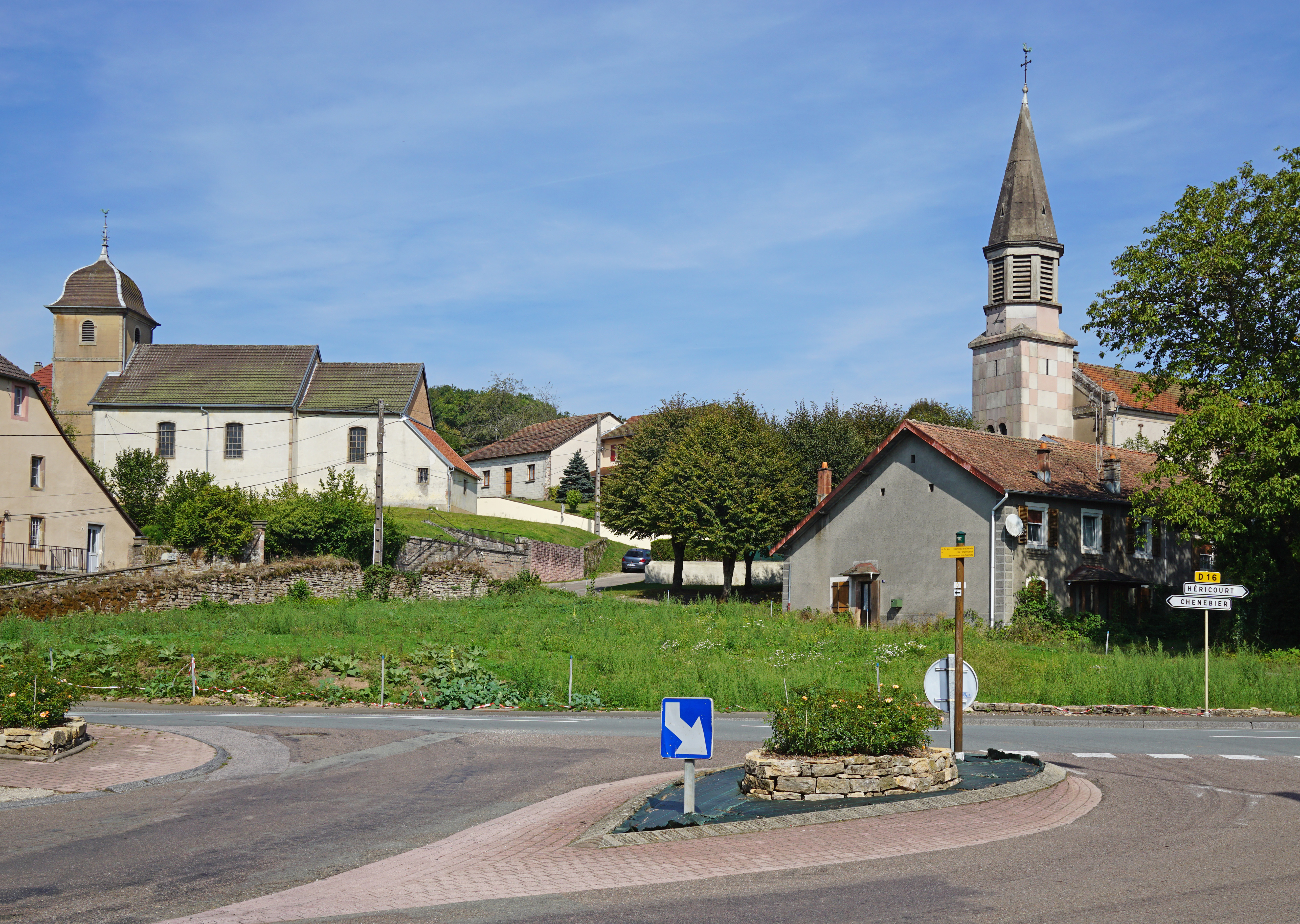 Les deux églises de Chagey.